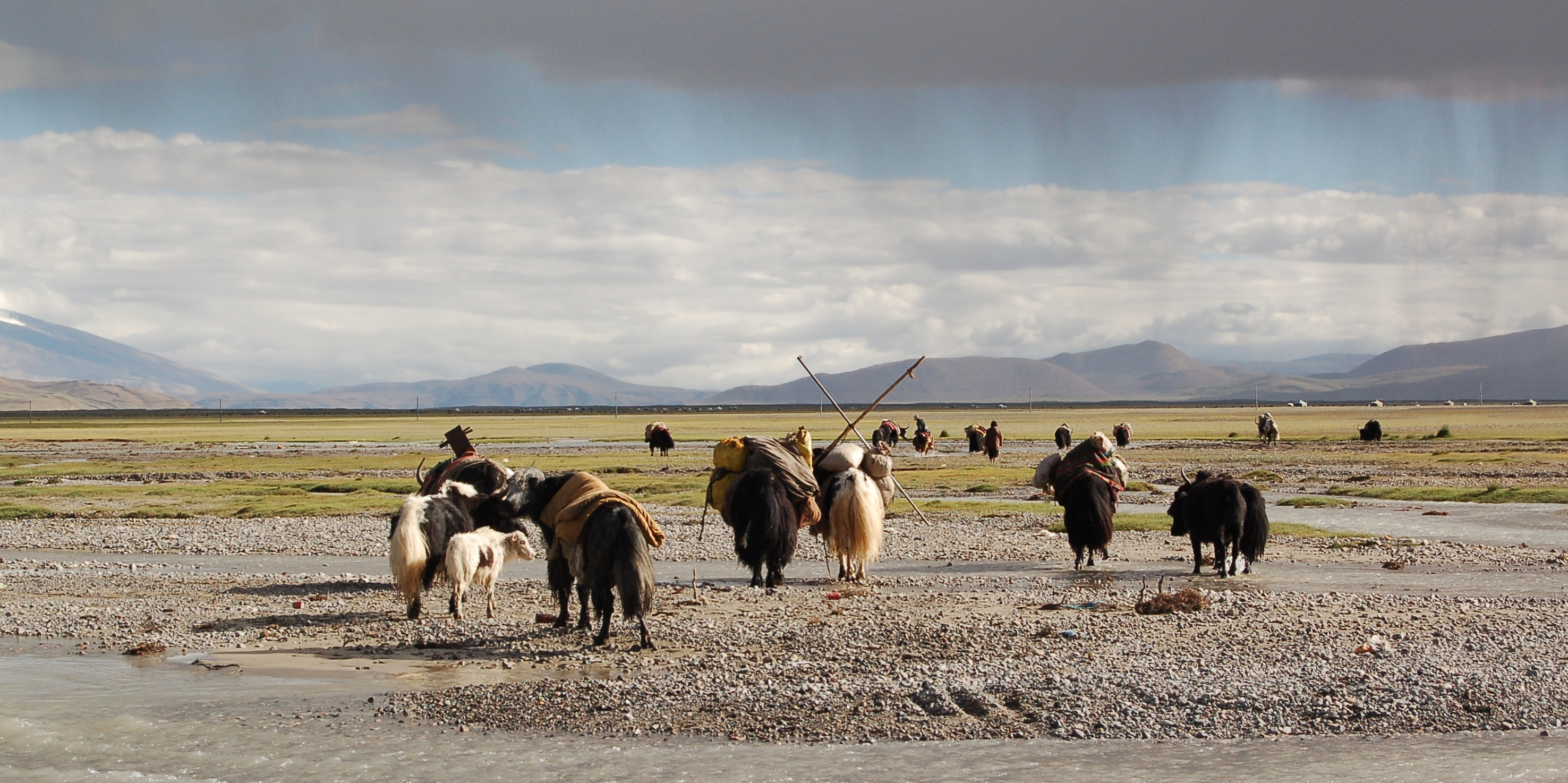 Nomaden auf der Wanderung in der Nähe des Kailash (Tibet)